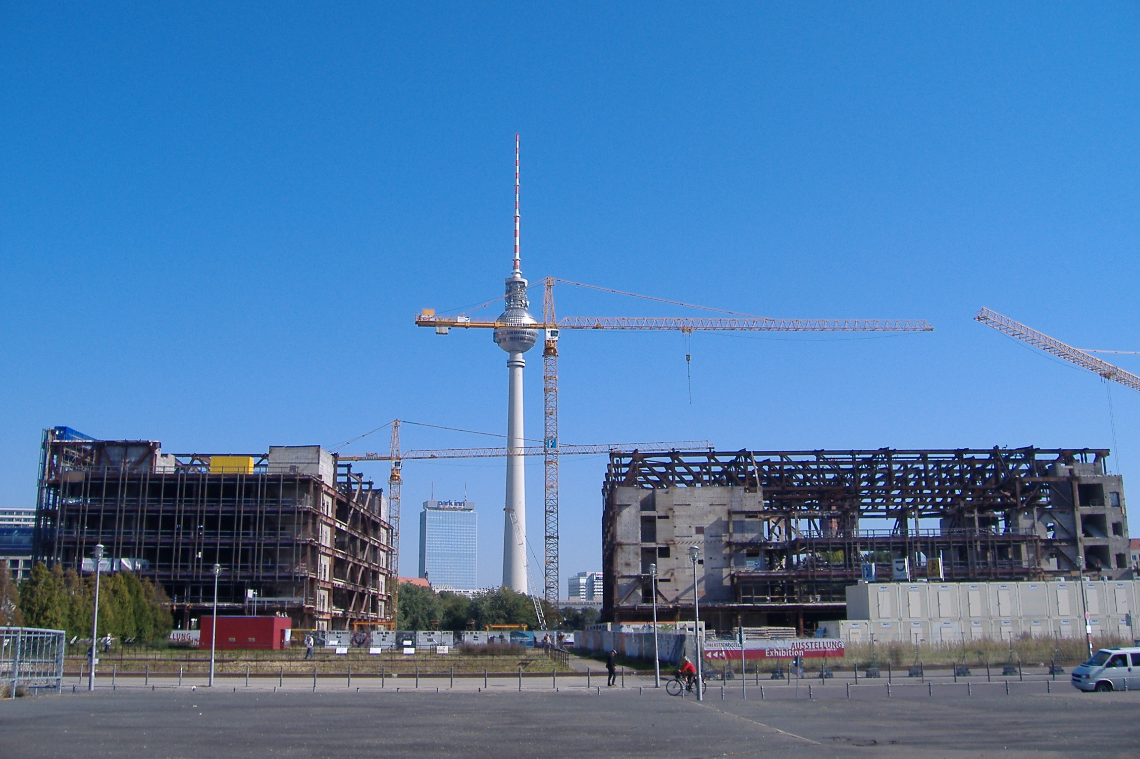 Berlin: Palast der Republik und Fernsehturm im September 2007